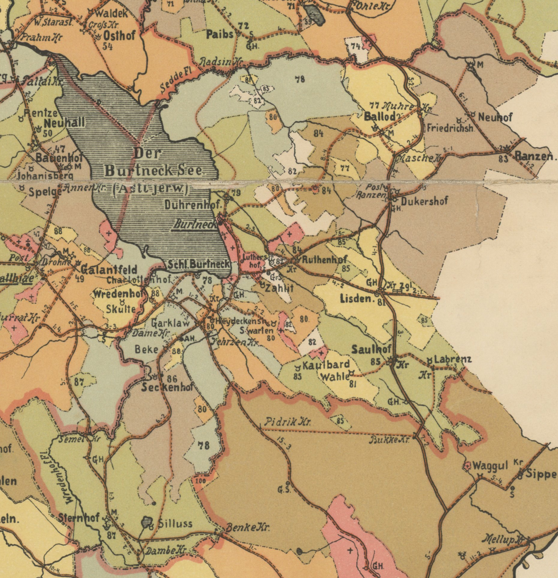 Astijärve kihelkonna mõisad 1903. aastal